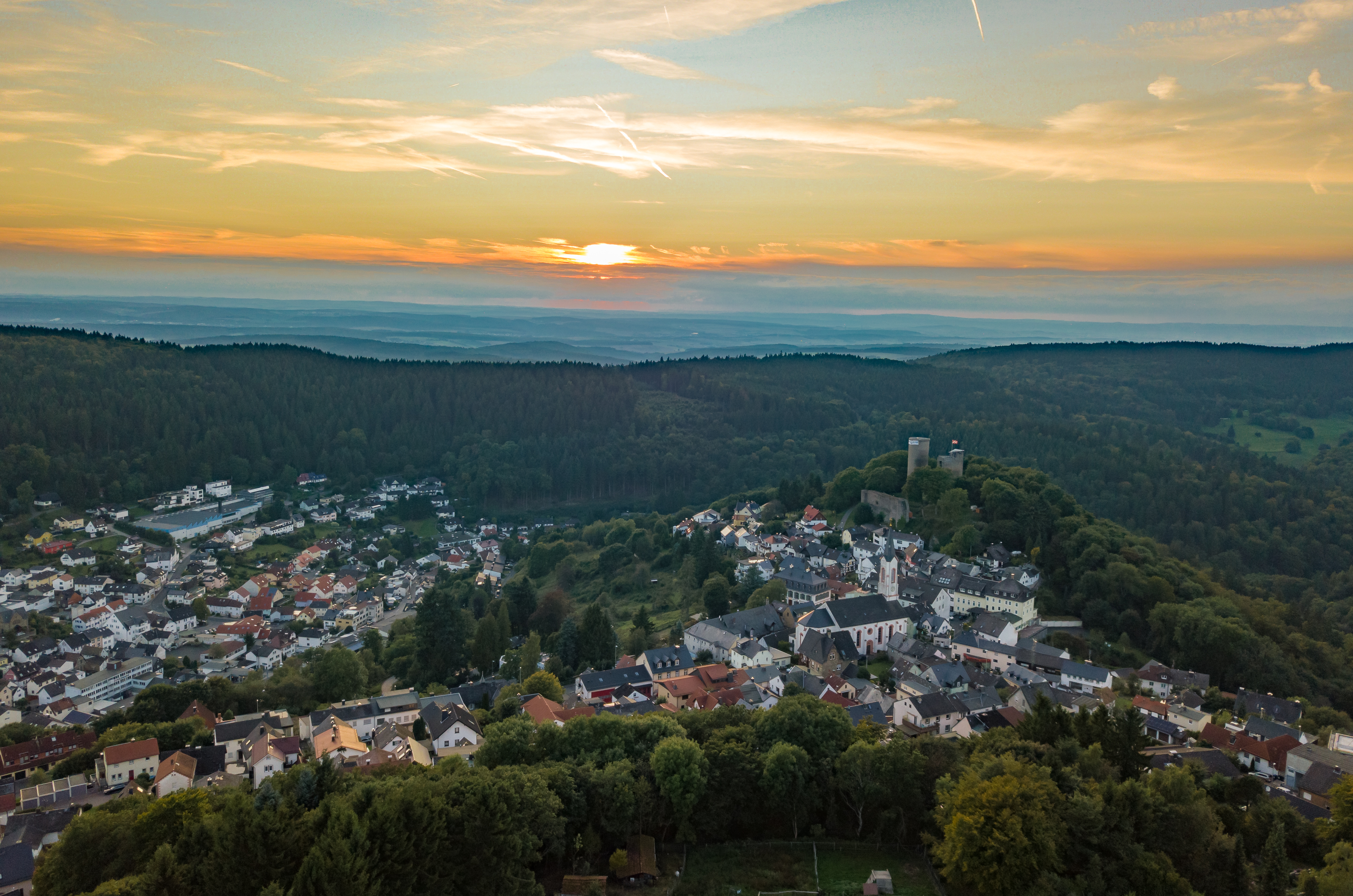 Luftbild von Niederreifenberg (links) und Oberreifenberg